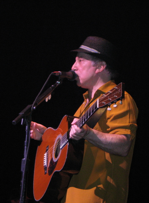 Paul Simon en concert à Paris, au Palais des Sports, le 11 juillet 2008